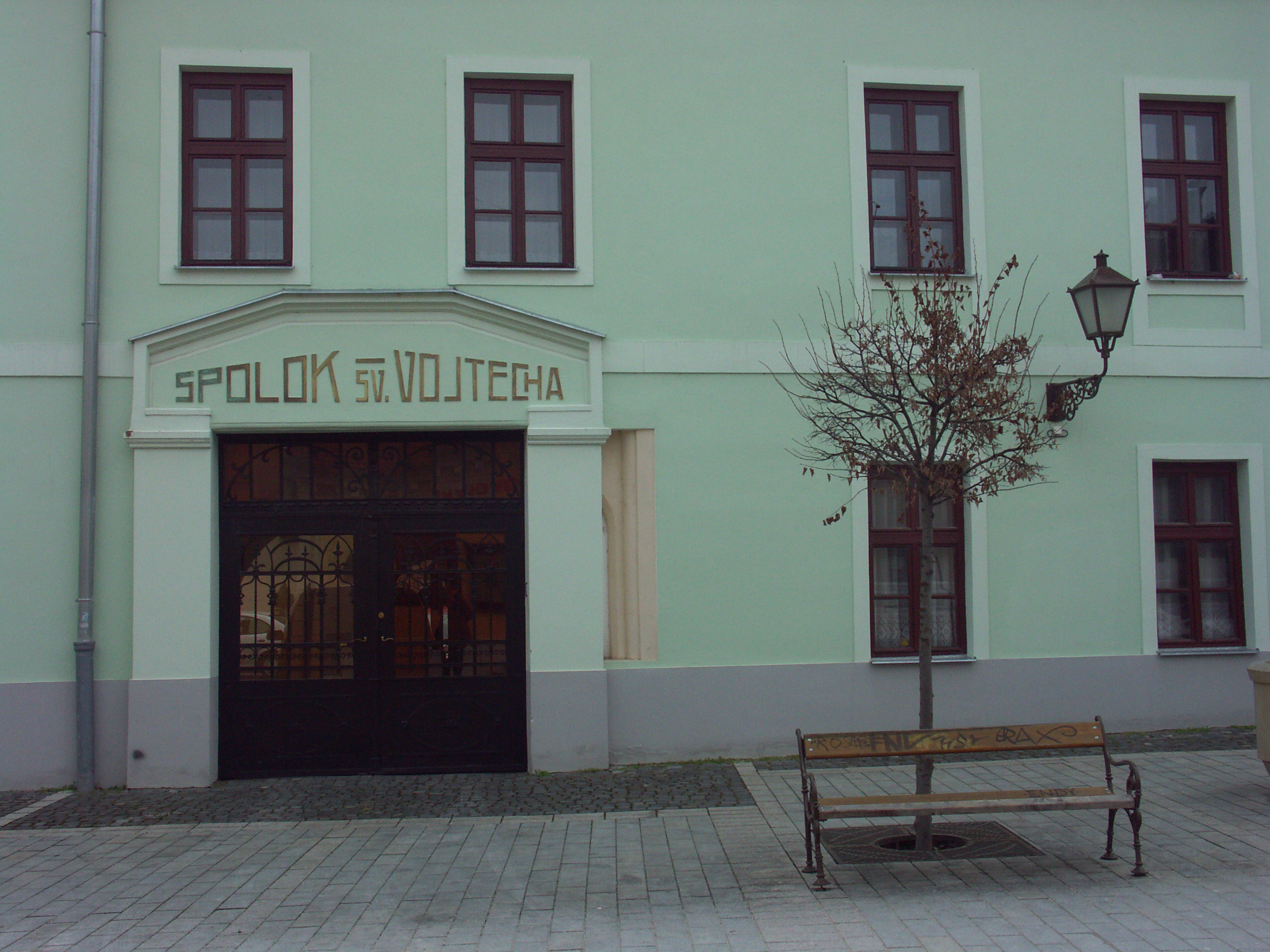 Author: Radovan Bahna, Slovakia Place: Slovakia, Trnava